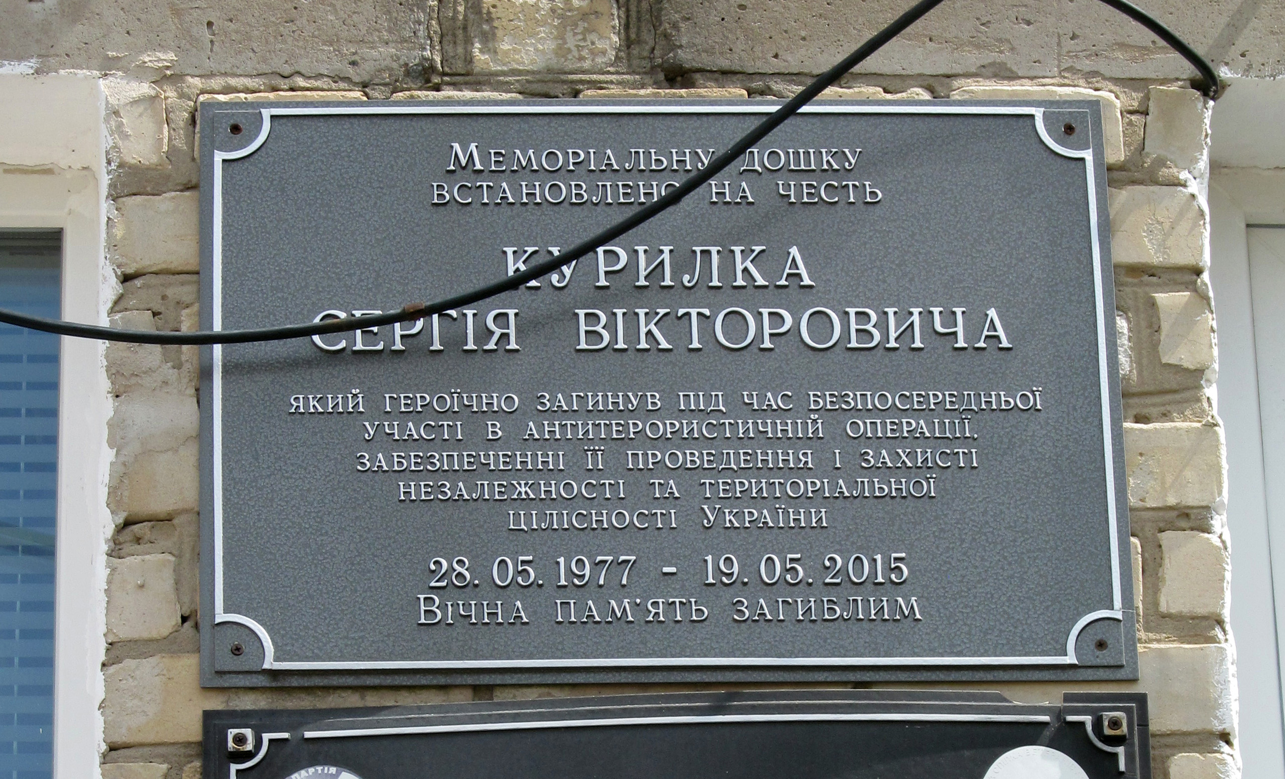 Меморіальна дошка в пам'ять Сергія Курилка, солдата Збройних сил України, встановлена на фасаді Вільшанського ліцею. СМТ Вільшани Дергачівського району Харківської області, вул. Центральна, 23.